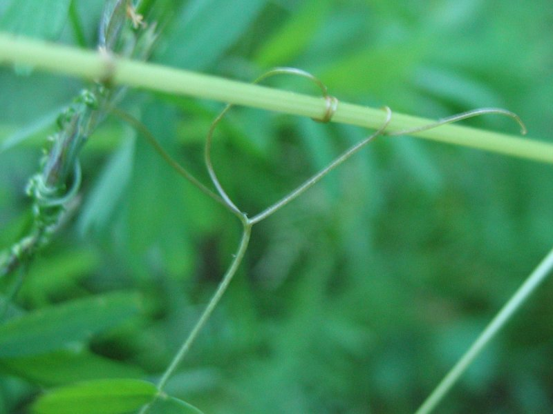 Blattranke der Rauhaarigen Wicke Vicia hirsuta